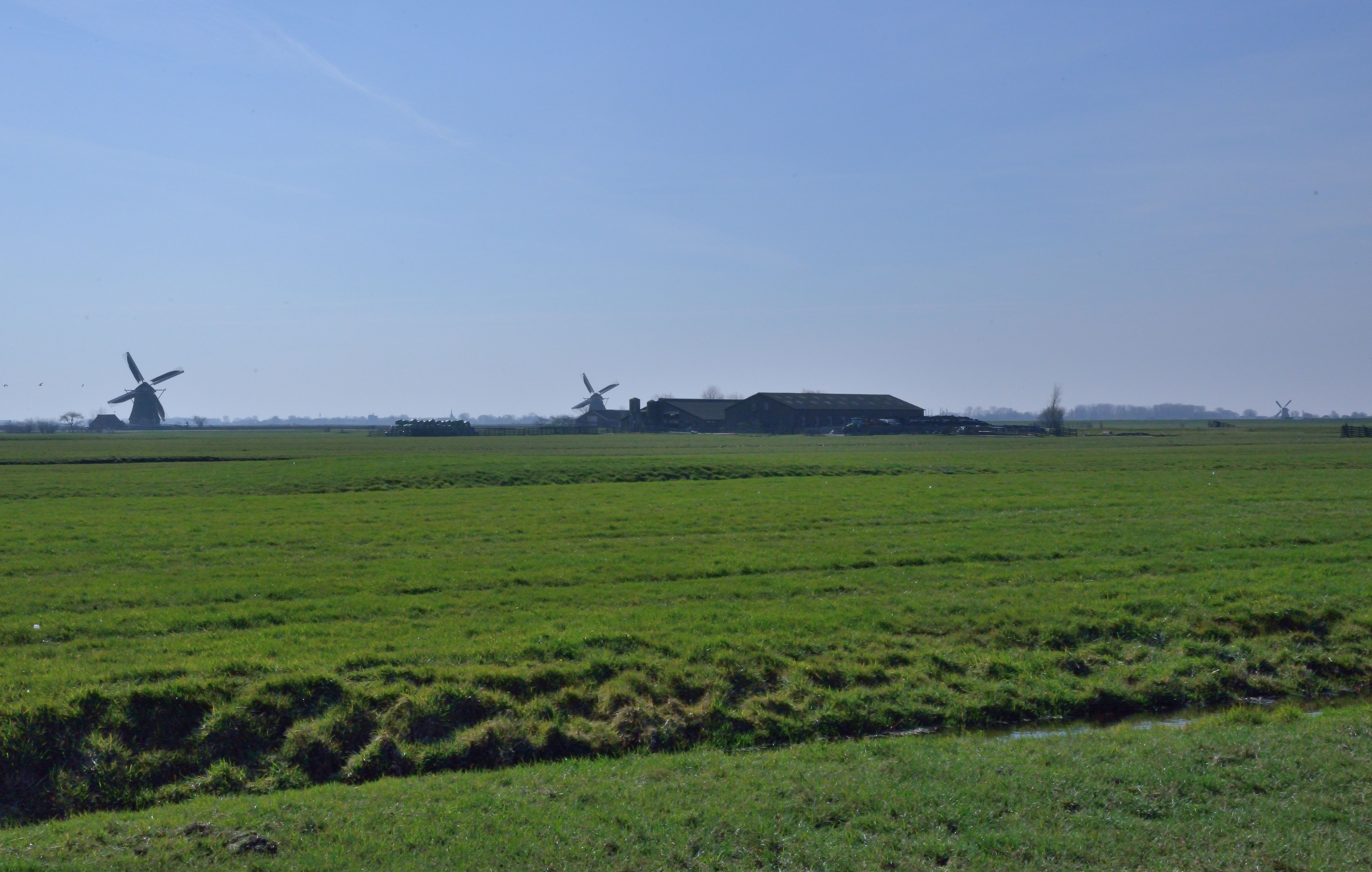 Aarlanderveen Molen No.4, De Put met de andere drie molens van de viergang